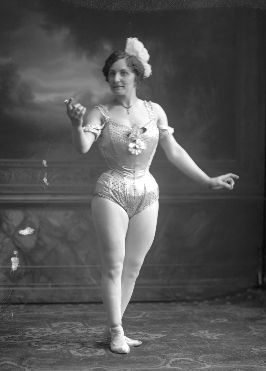 Fru Ingeborg Baltzola, Cirkus Hoffman. AVBILDAD - NAMN Gröning, Valborg Elisabeth